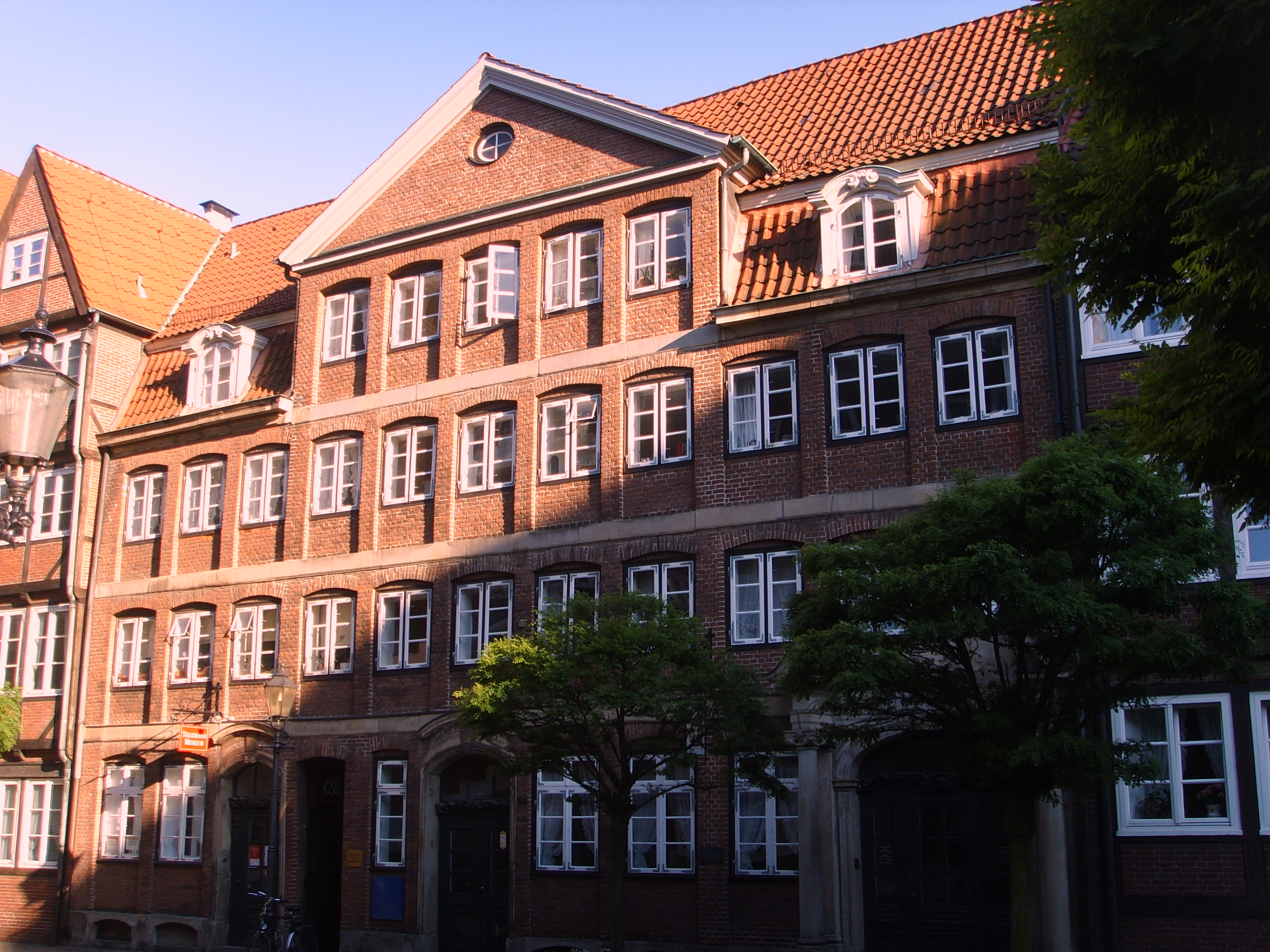 Telemann-Museum in Hamburg